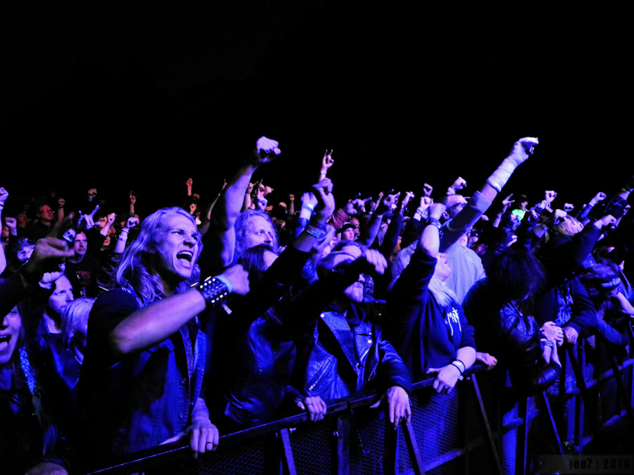 Raskemuusika publik muusikafestivalil Hard Rock Laager 2019 kuulamas Rootsi ansamblit Dark Funeral.